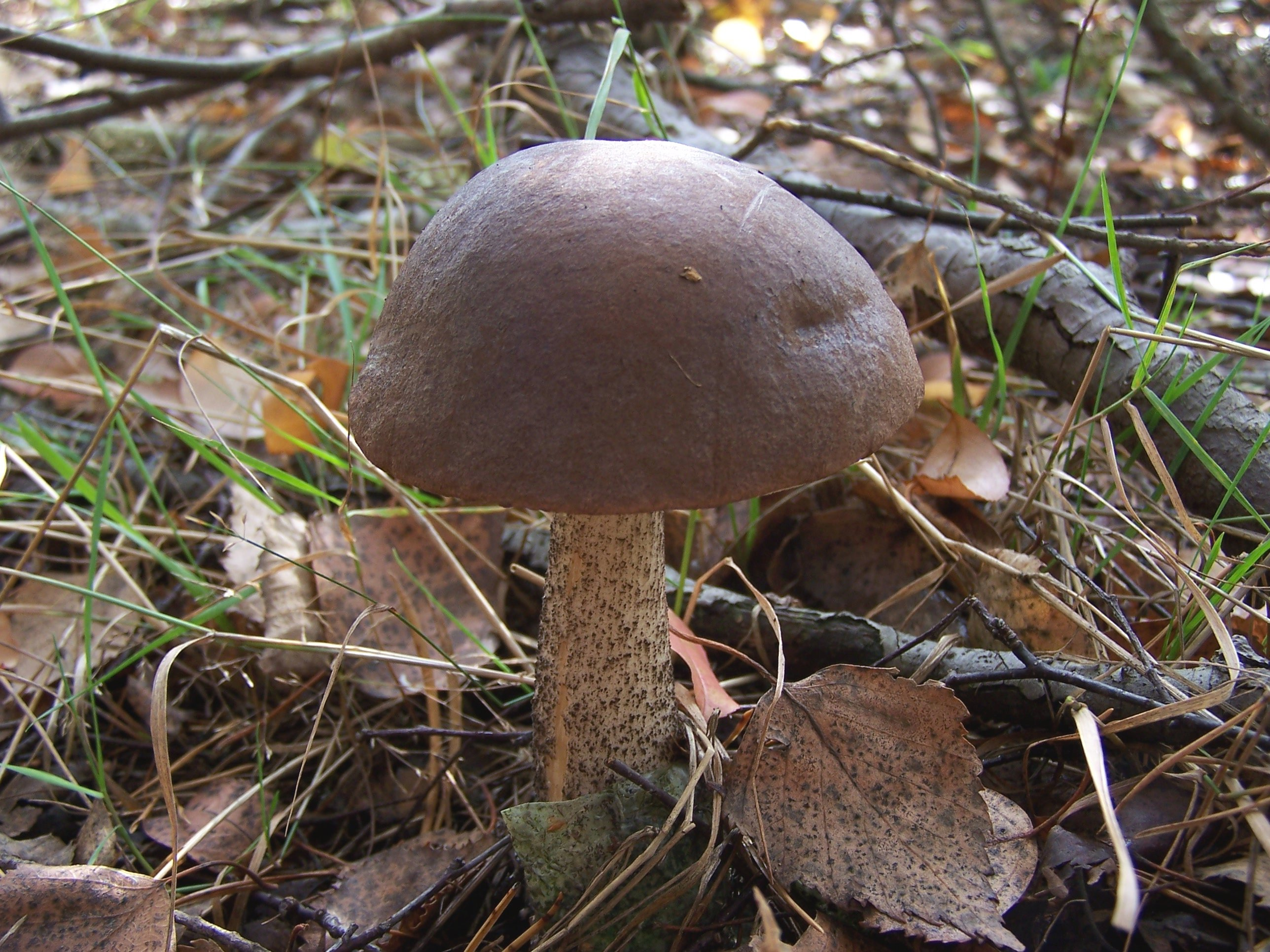 Leccinum scabrum